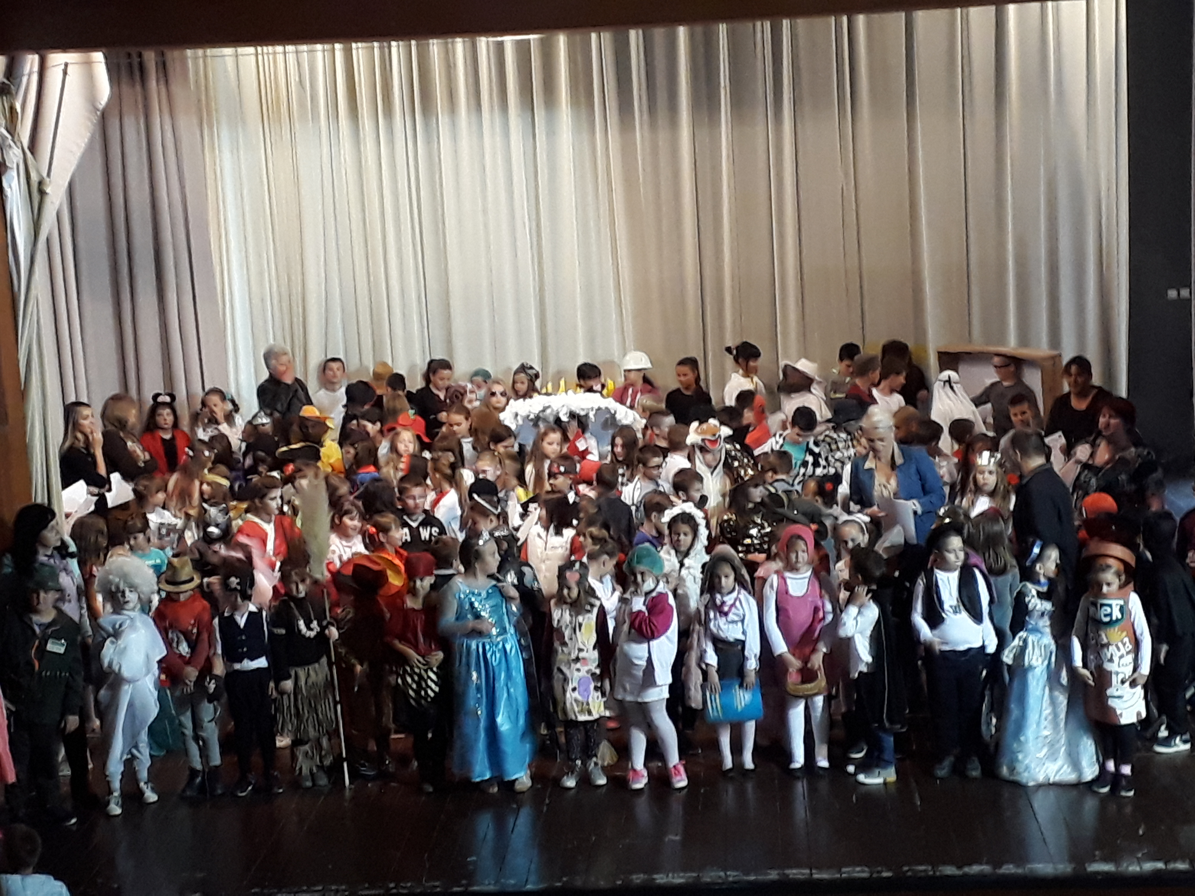 Маскенбал